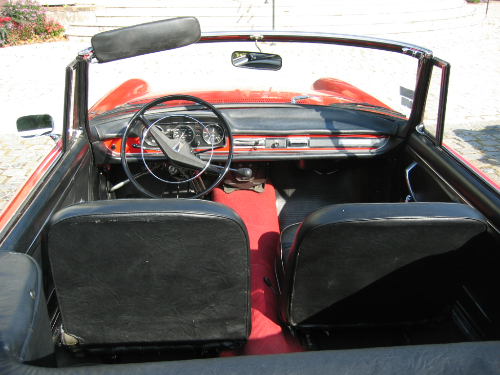 Peugeot 404 Cabriolet